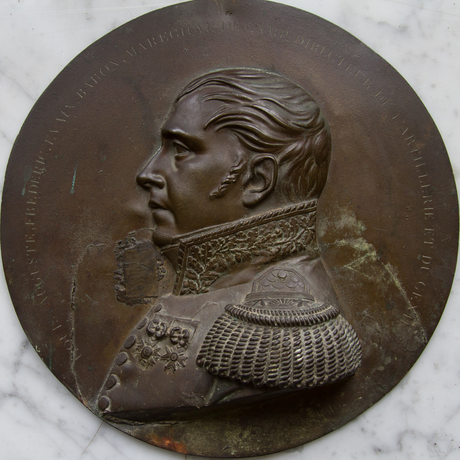 Louis (Auguste Frédéric) EVAIN. 1775-1832. Maréchal de camp. Directeur de l'Artillerie et du Génie